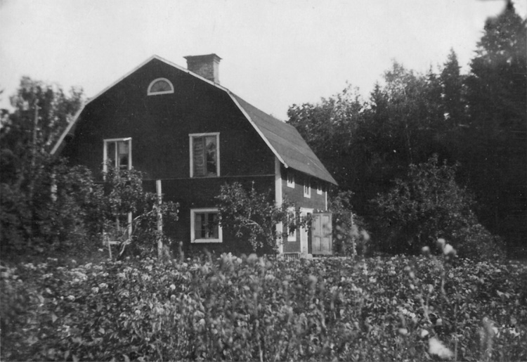 Torpet Henriksdal, det låg under Sandviks gård, Viksjö, Järfälla. Torpet upptages i husförhörsboken från 1866 och bebos då av torparen Gustaf Andersson, som är kvar på torpet ända till 1904. Huset brann ned 1931. Det låg precis norr om nuvarande huset "Milan", som har flyttats dit från Kolarängen, och som nu finns på Henriksdals område.